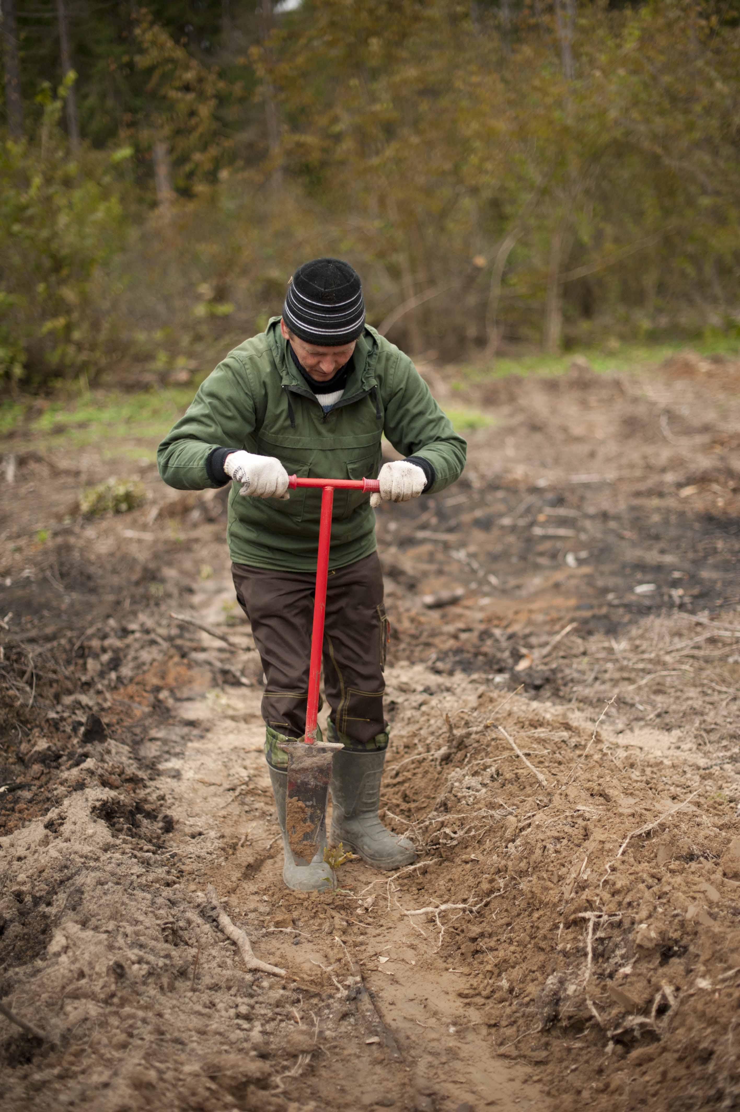 На территории национального парка